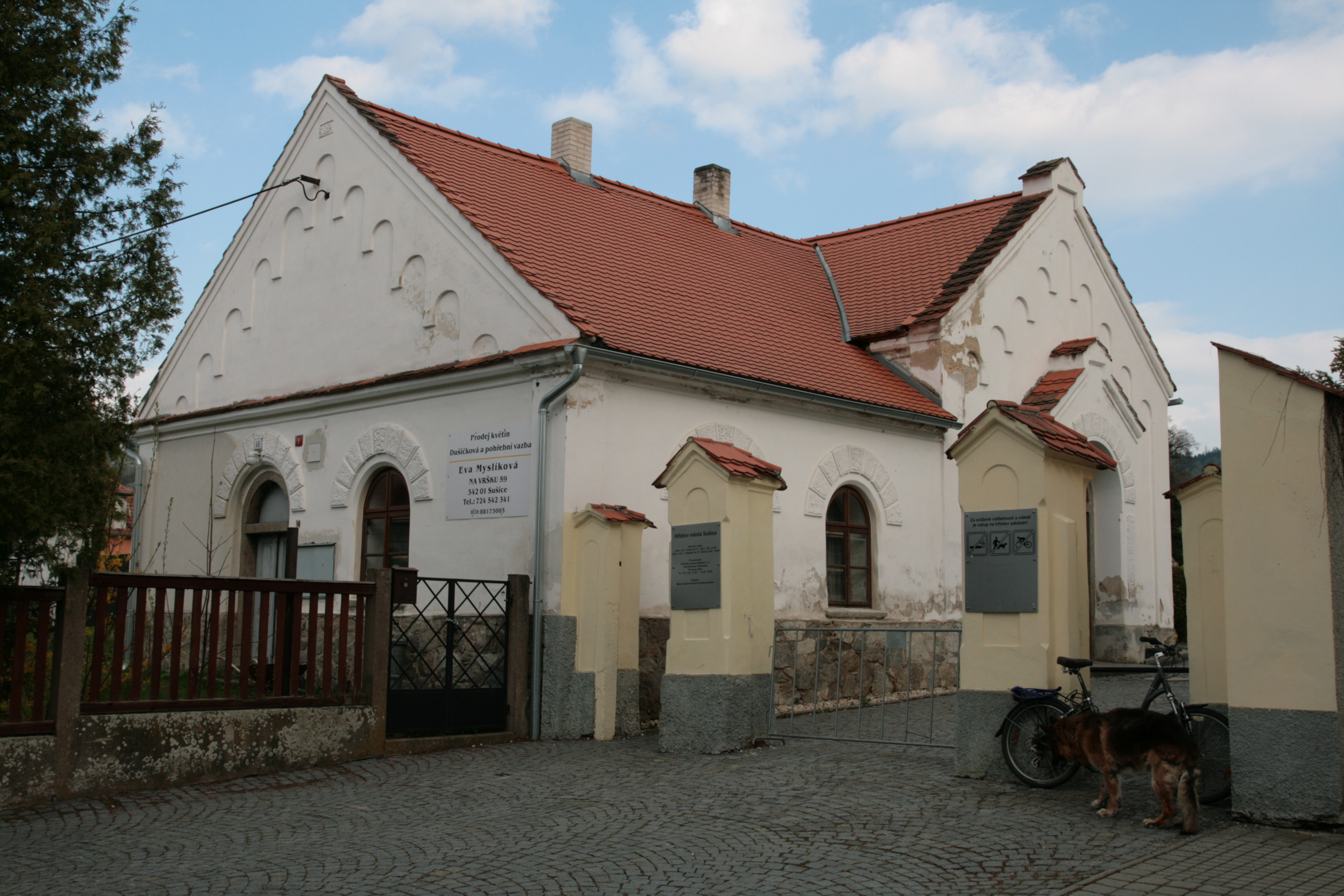 Město Sušice v okrese Klatovy. Městský hřbitov Sušice. Dům čp. 59 v ulici Na Vršku, u vstupu na hřbitov.